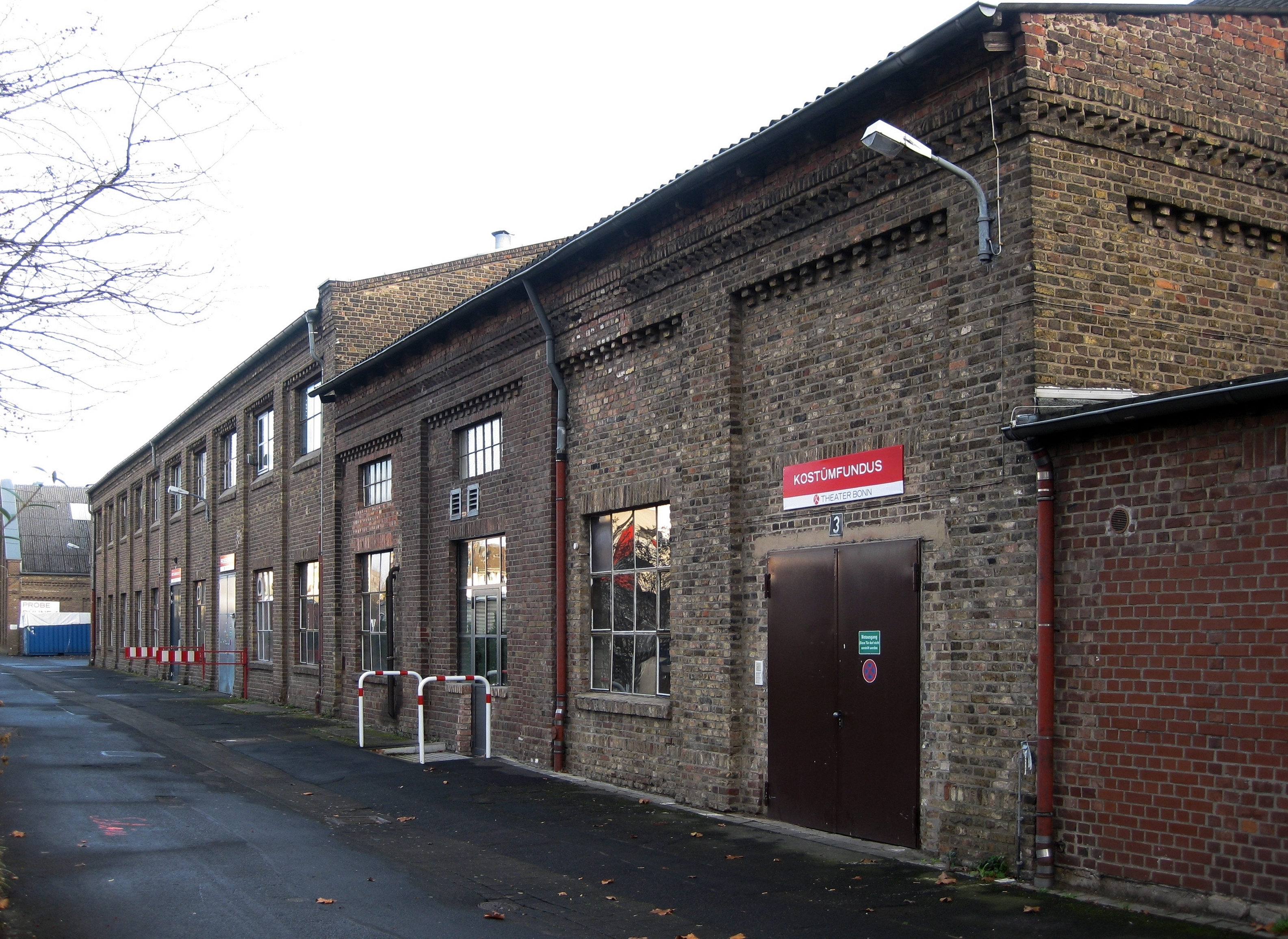 Deutschland, Bonn-Beuel, Siegburger Straße 42 (Bushaltestelle Pantheon Beuel): Einfahrt zu den als Baudenkmal geschützten Fabrikanlagen einer ehemaligen Jutefabrik (gegr. 1868). Im Bild links: das 1910 erbaute Pförtnerhaus, in der Mitte: die ehemalige Maschinenhalle. Seit 1981 ist das Gelände im Besitz der Stadt Bonn. Zum Zeitpunkt der Aufnahme war das Bonner Theater (Schauspiel & Oper) Nutzer des Hallenkomplexes mit seinen Schauspielhallen; genannt „Halle Beuel“. Dort sind neben Probe- und Aufführungsbühnen auch Verwaltungsbüros, Werkstätten für Bühnenbau, Kostümschneiderei, Maskenbildnerei und Lager untergebracht. Für Publikumsaufführungen wurden drei Hallen genutzt: die eigentliche "Halle Beuel, "Lampenlager" und "Alter Malersaal". Auf dem Gelände verfügt auch die Freiwillige Feuerwehr Beuel über Garagen mit Einsatzfahrzeugen und ein Büro.